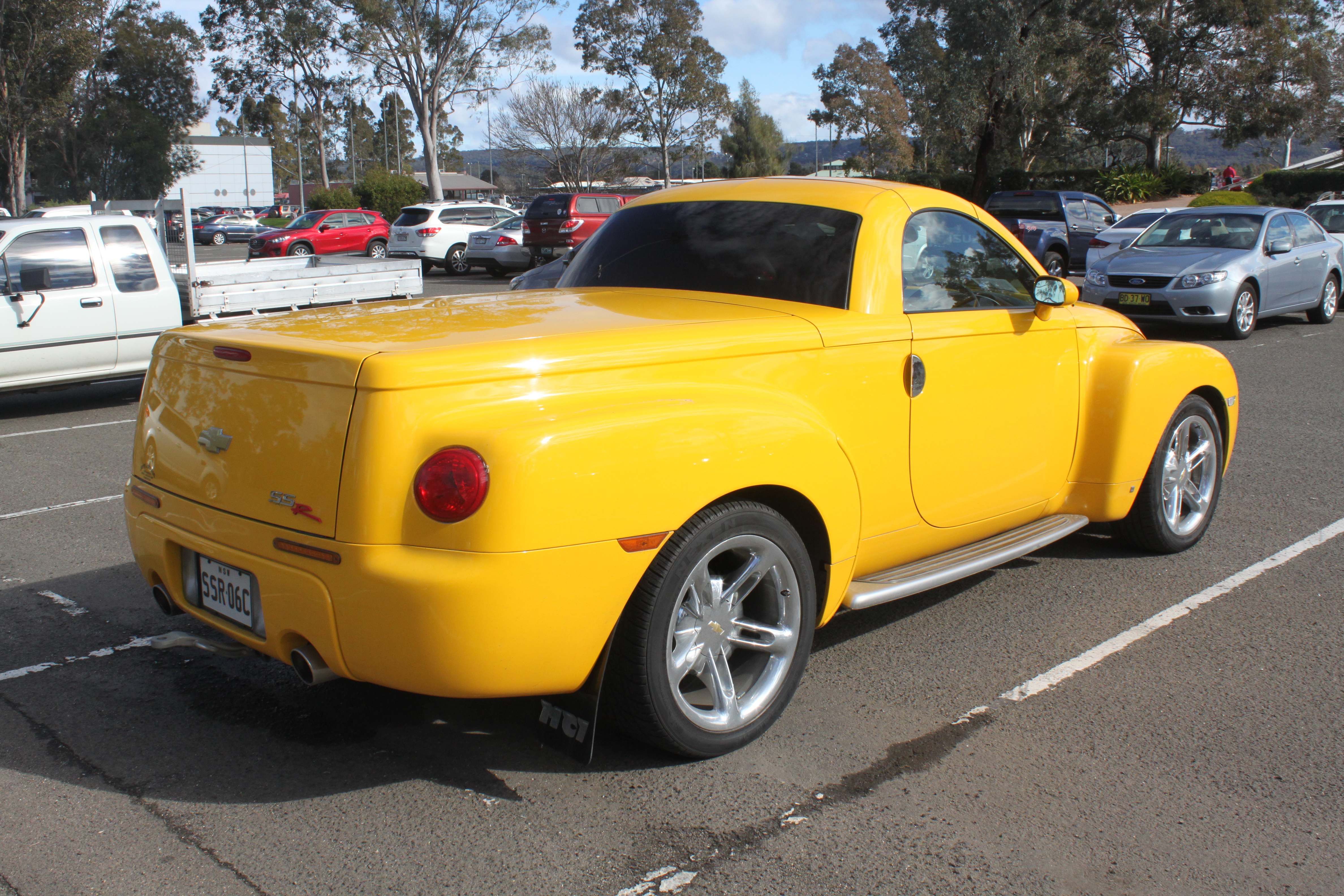 Chevrolet SSR